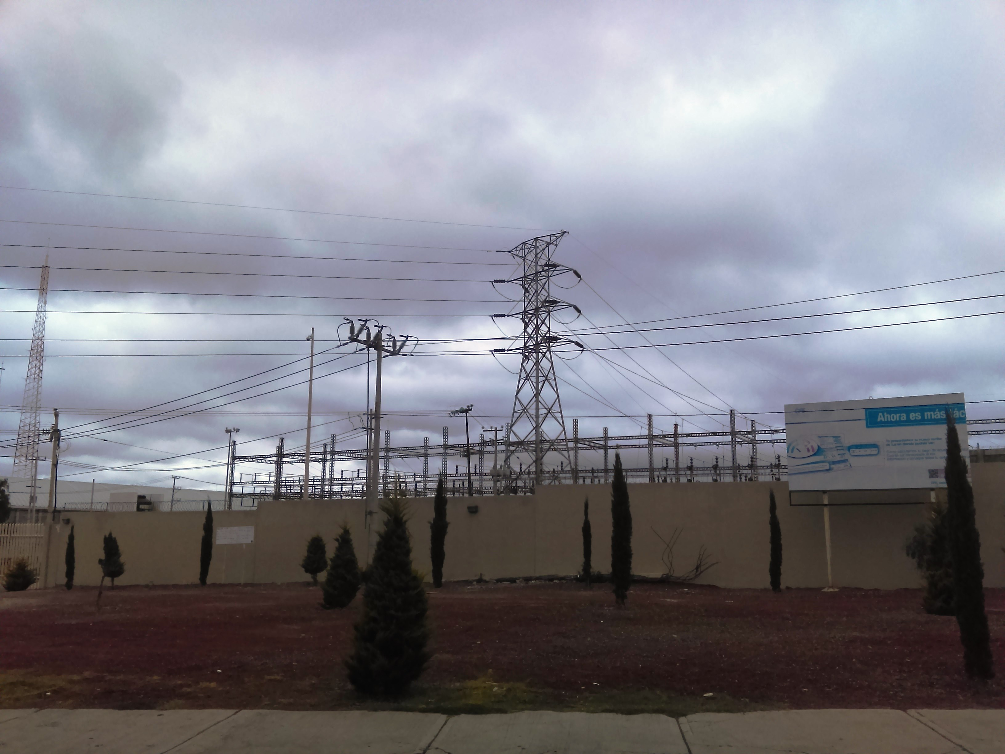 Subestación Eléctrica de Santa Julia